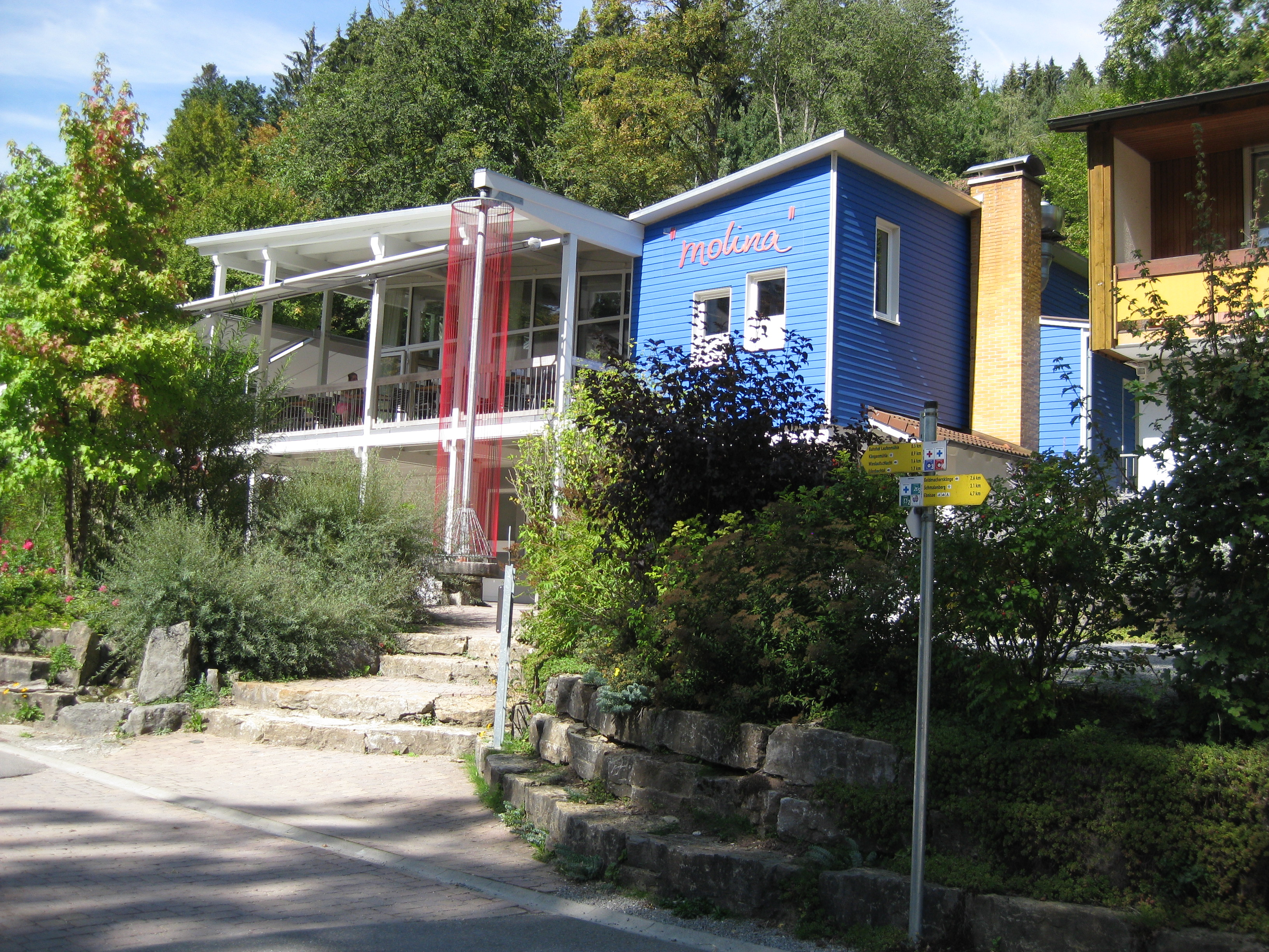 Erfahrungsfeld der Sinne Eins+Alles, ein Freizeit- und Erlebnispark im Welzheimer Wald Café-Restaurant molina